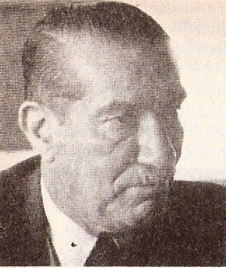 MarioAmadeo, canciller argentino durante el gobierno de Lonardi